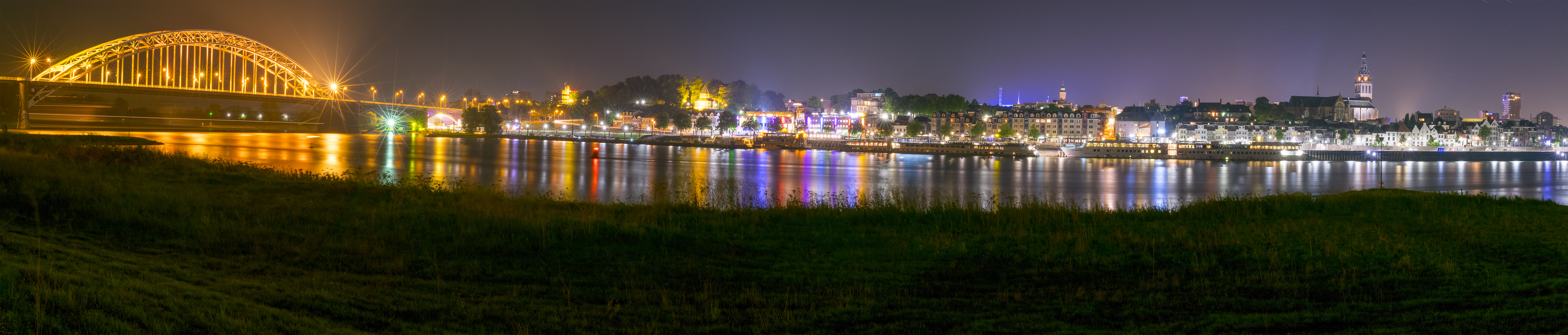 Nachtfoto van Nijmegen genomen aan de kant van Lent